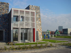 Woning van architect Marlies Rohmer van de bouwexpositie 2001 te Almere.